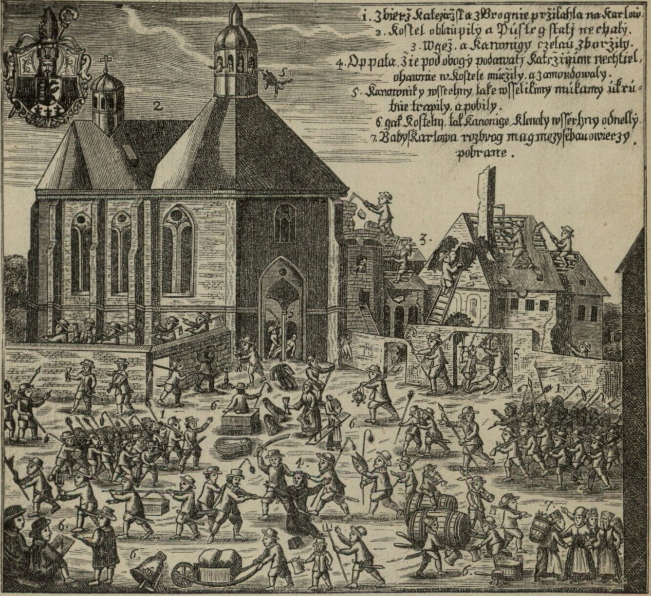 Drancování kláštera a kostela na Karlově při vpádu Pasovských v roce 1611.